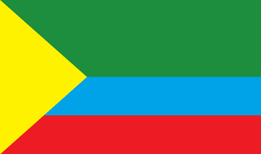 Bandera de Chilla